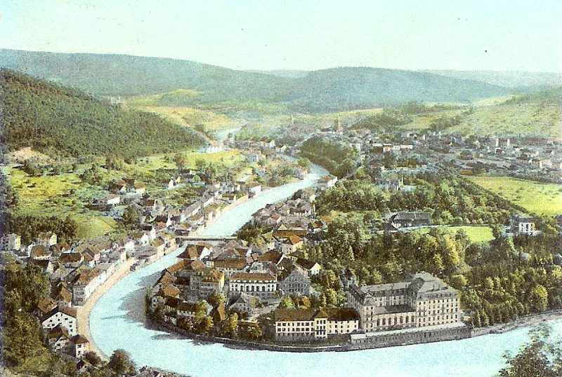 Die Stadt Baden (Aargau) um 1900 auf einer Postkarte. Im Vordergrund das Bäderquartier, rechts hinten das Industriequartier (BBC), hinten in der Mitte die Altstadt, links Ennetbaden.